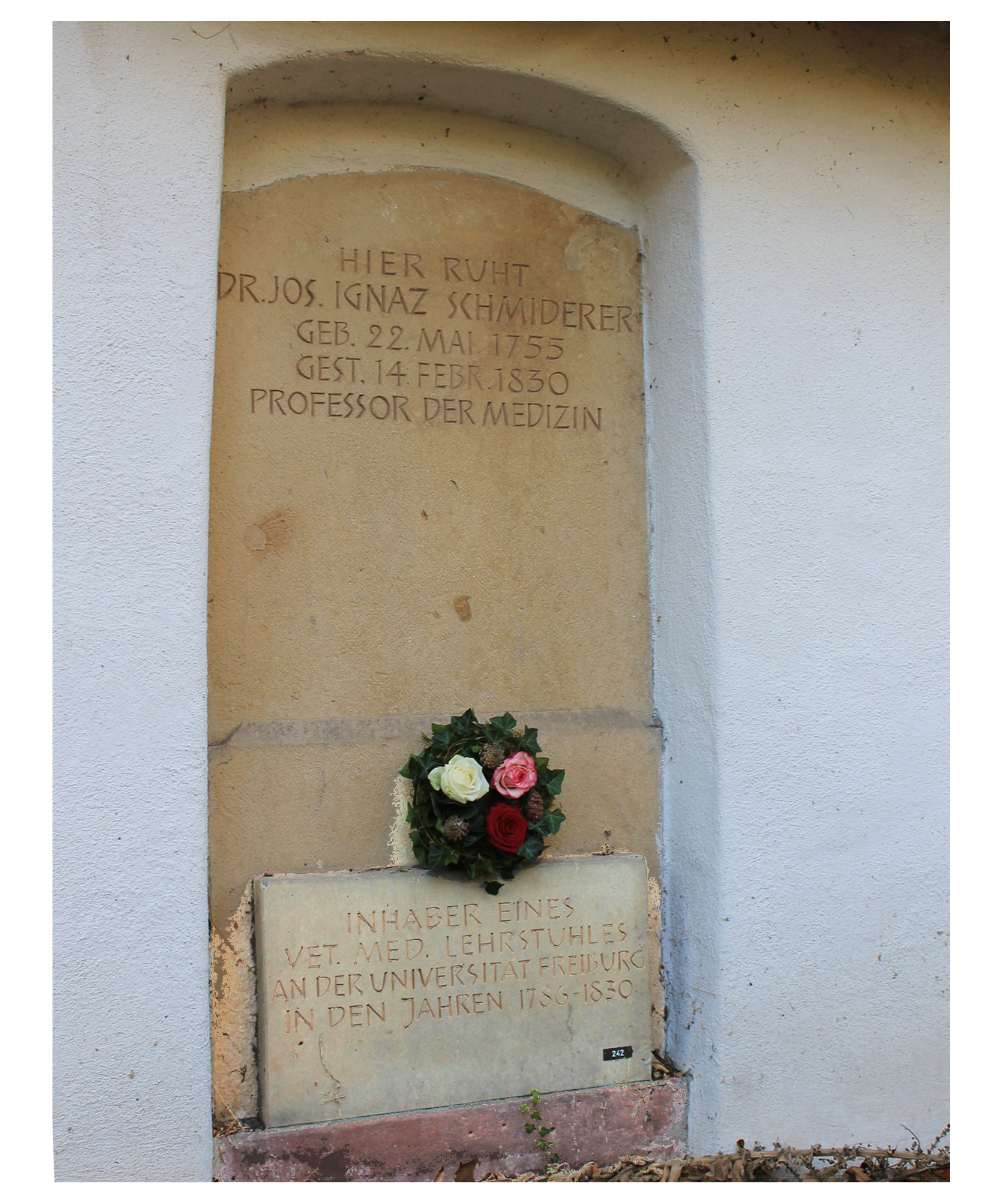 Grab J.I. Schmiederer